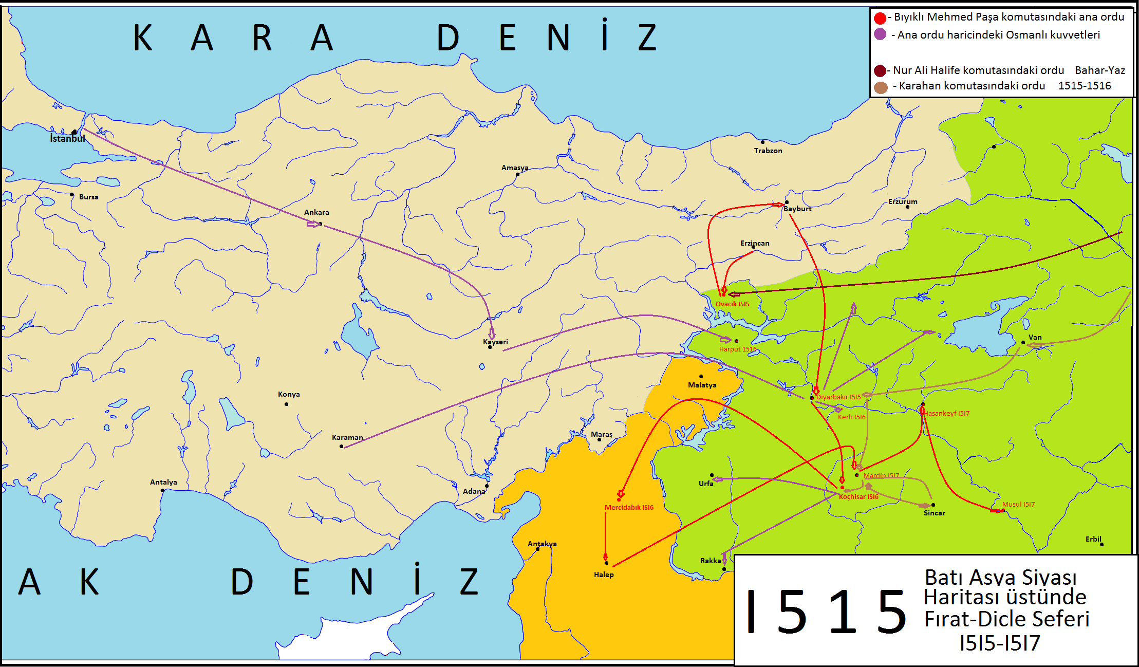 Bıyıklı Mehmed Paşa komutasındaki Fırat-Dicle Seferi'nin harekat haritası